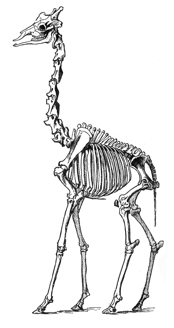 Giraffe Skeleton